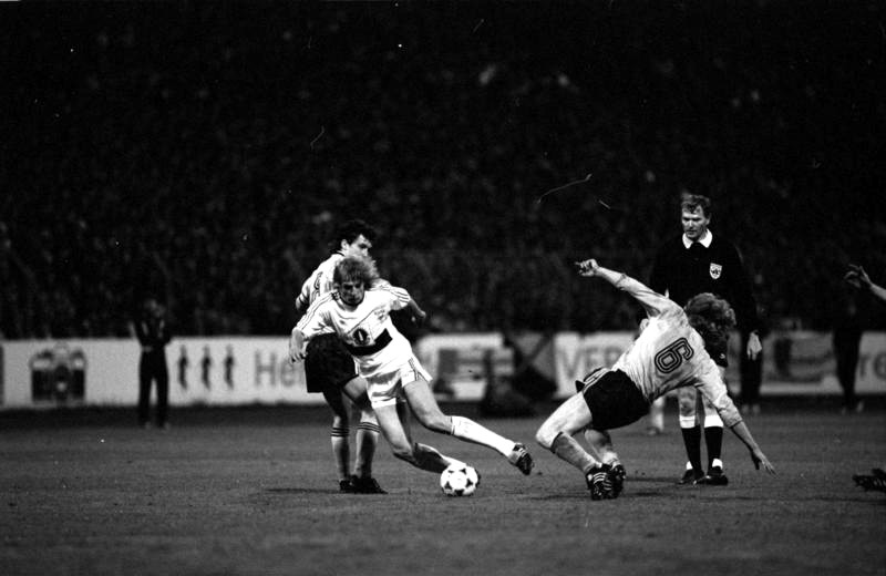 Dresden: Fußball-UEFA-Cup/SG Dynamo Dresden - VFB Stuttgart 1:1. VFB-Mittelstürmer Jürgen Klinsmann hat sich den Ball gegen Matthias Sammer (r.) und Hans-Uwe Pilz erkämpft.